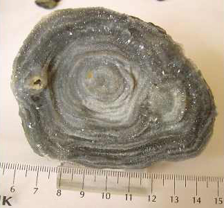 minerał, chalcedon, konkrecja; autor zdjęcia Ewa Jastrzębska 16.07.2006r.